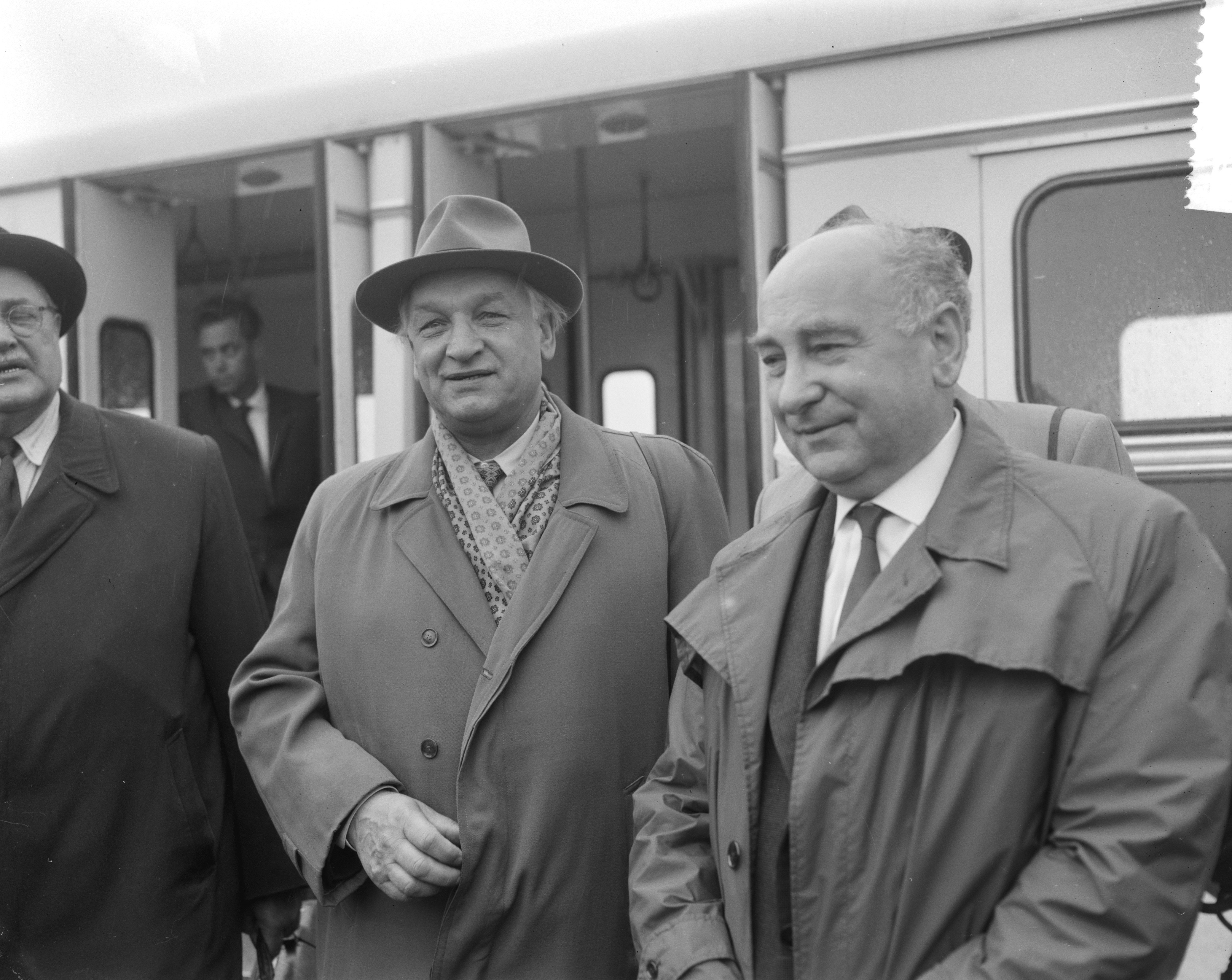 Vice President van Rusland Palezkis op Schiphol. Palezkis en Ponomarenko